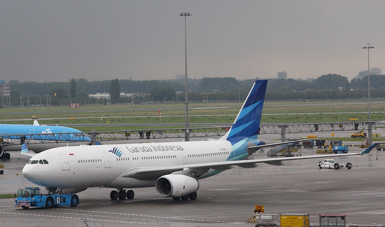 Garuda Indonesia A330-200 op schiphol